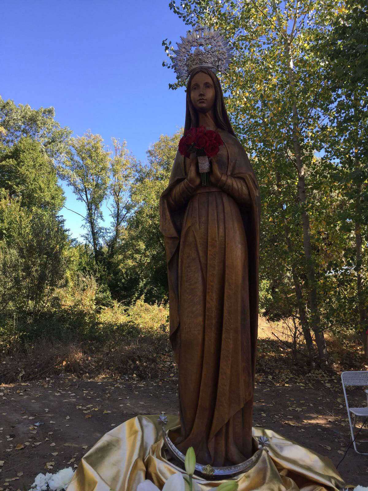 Santa Maria del Alberche